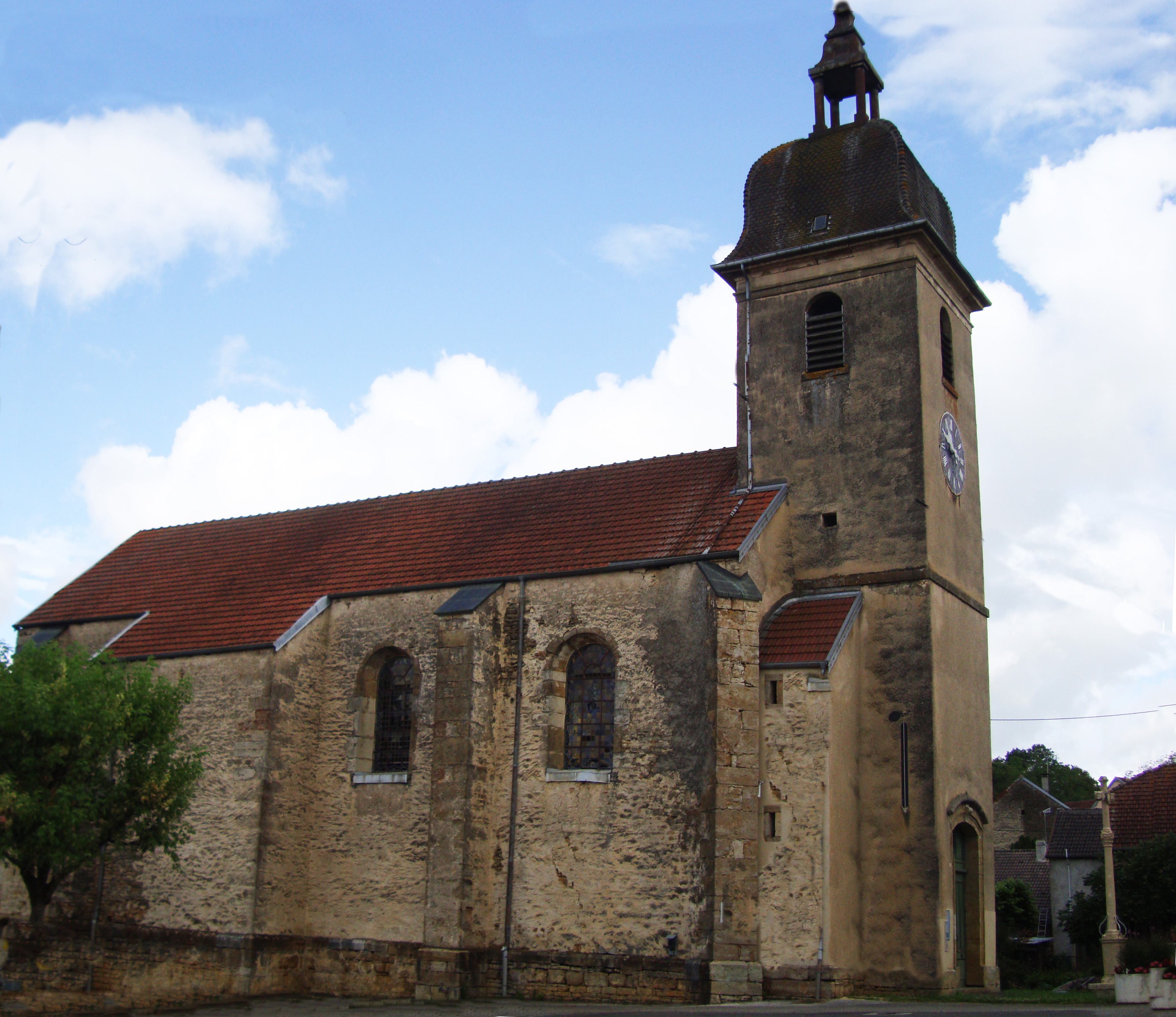 Église Saint-Just de Montcey (Haute-Saône, France). Cloches de 1837 et 1857, horloge de Schwilgué.